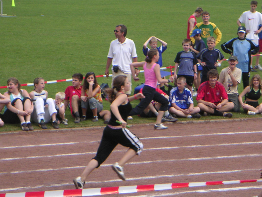 Sportfest (hier: Staffellauf der 7. Klässler) des Schalker Gymnasiums Gelsenkirchen im Jahnstadion 2005